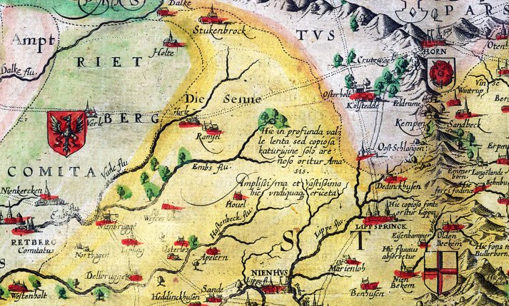 Paderbornensis Episcopatus Descriptio Nova (Neue Darstellung des Bistums Paderborn) (Ausschnitt)